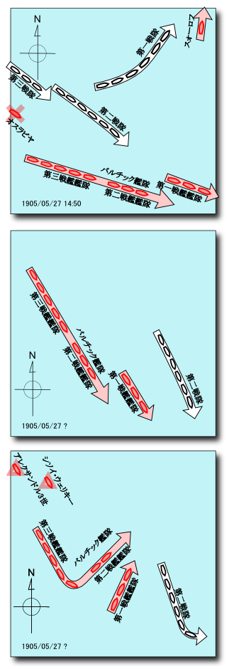 日本海海戦 位置4-6 日本語